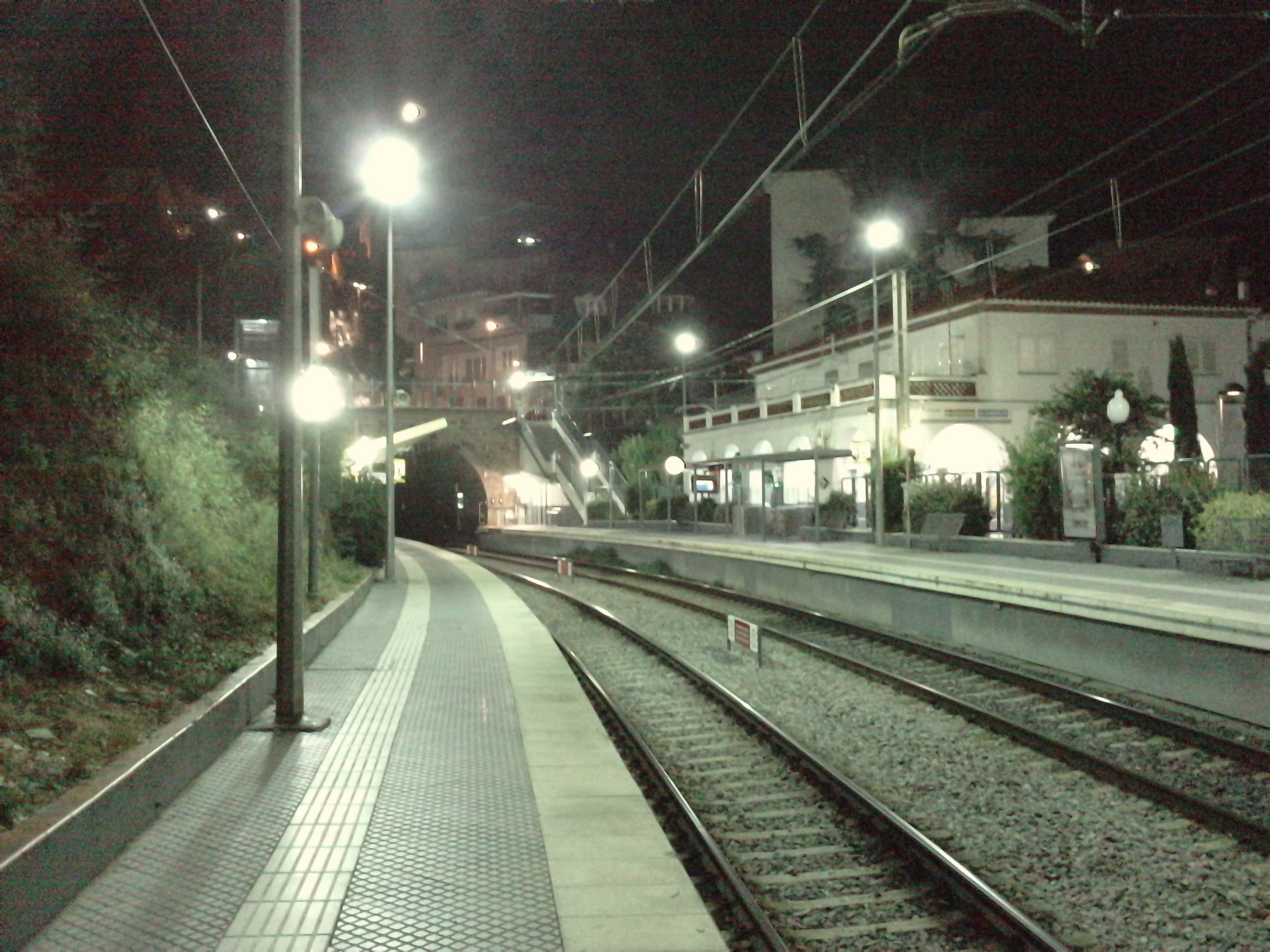 Estació de la Floresta. S2-Ferrocarrils catalans de la Generalitat